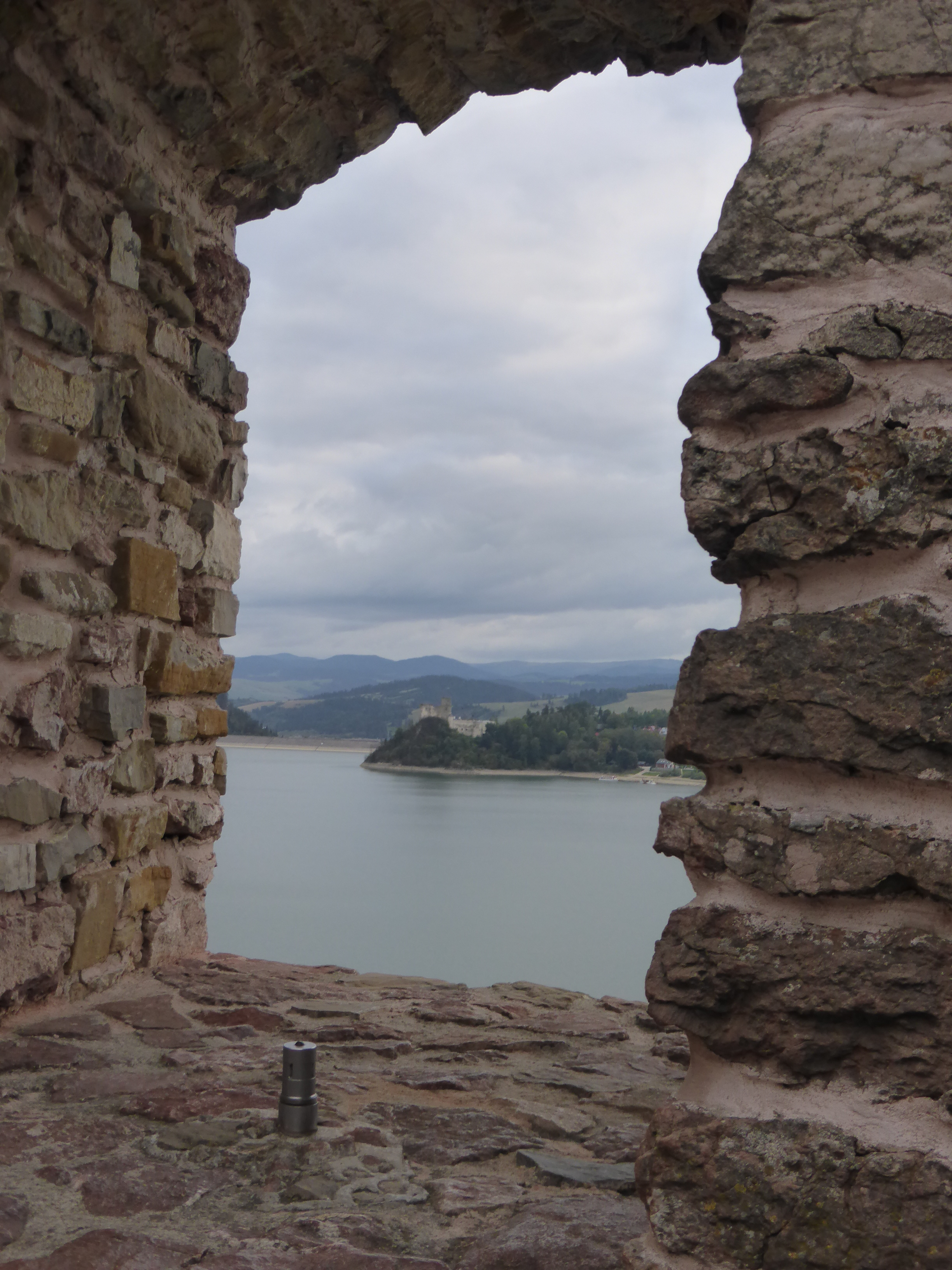 Czorsztyn Castle - Ausblick auf den Stausee